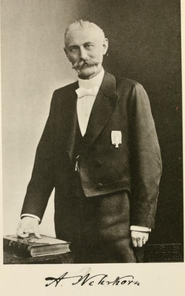 Foto aus dem Buch "Katalog der Eiersammlung, nebst Beschreibungen der aussereuropäischen Eier (1910)". Verlag von R. Friedländer und Sohn. Berlin von Adolph Nehrkorn